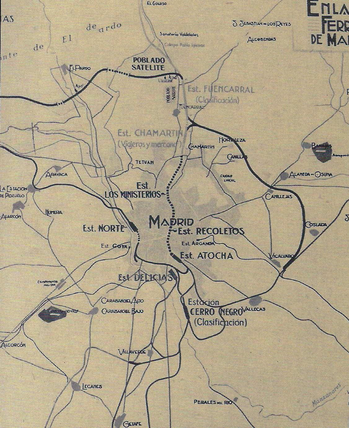 Mapa parcial de la propuesta de Enlaces Ferroviarios de Madrid hecha en 1932.1933